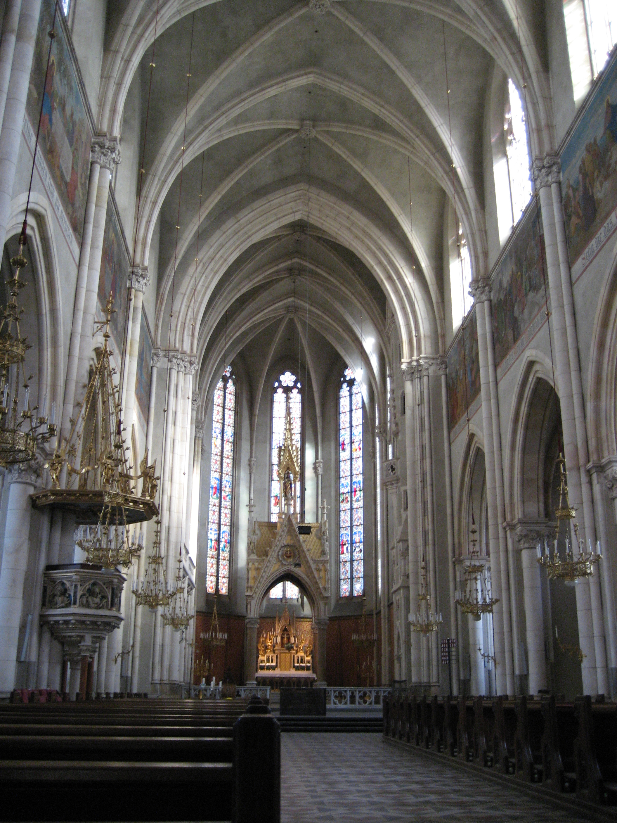 Herz-Jesu-Kirche in Graz, Österreich